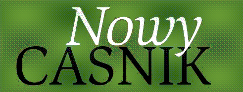 Titelzeile